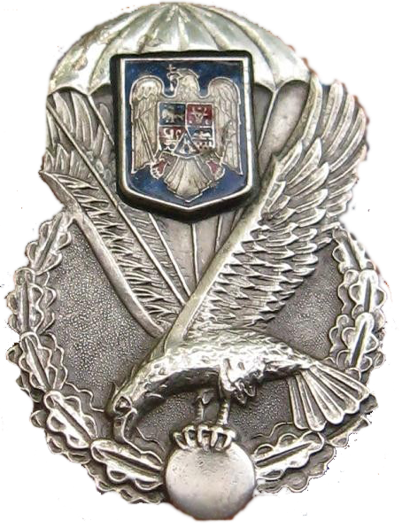 Brevetto di paracadutista militare romeno